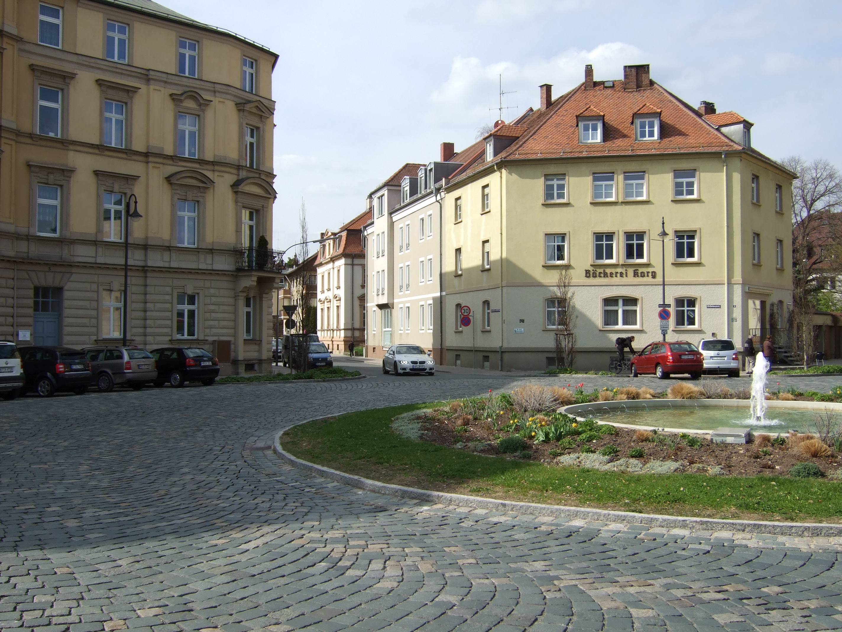 Wilhelmsplatz in Bayreuth